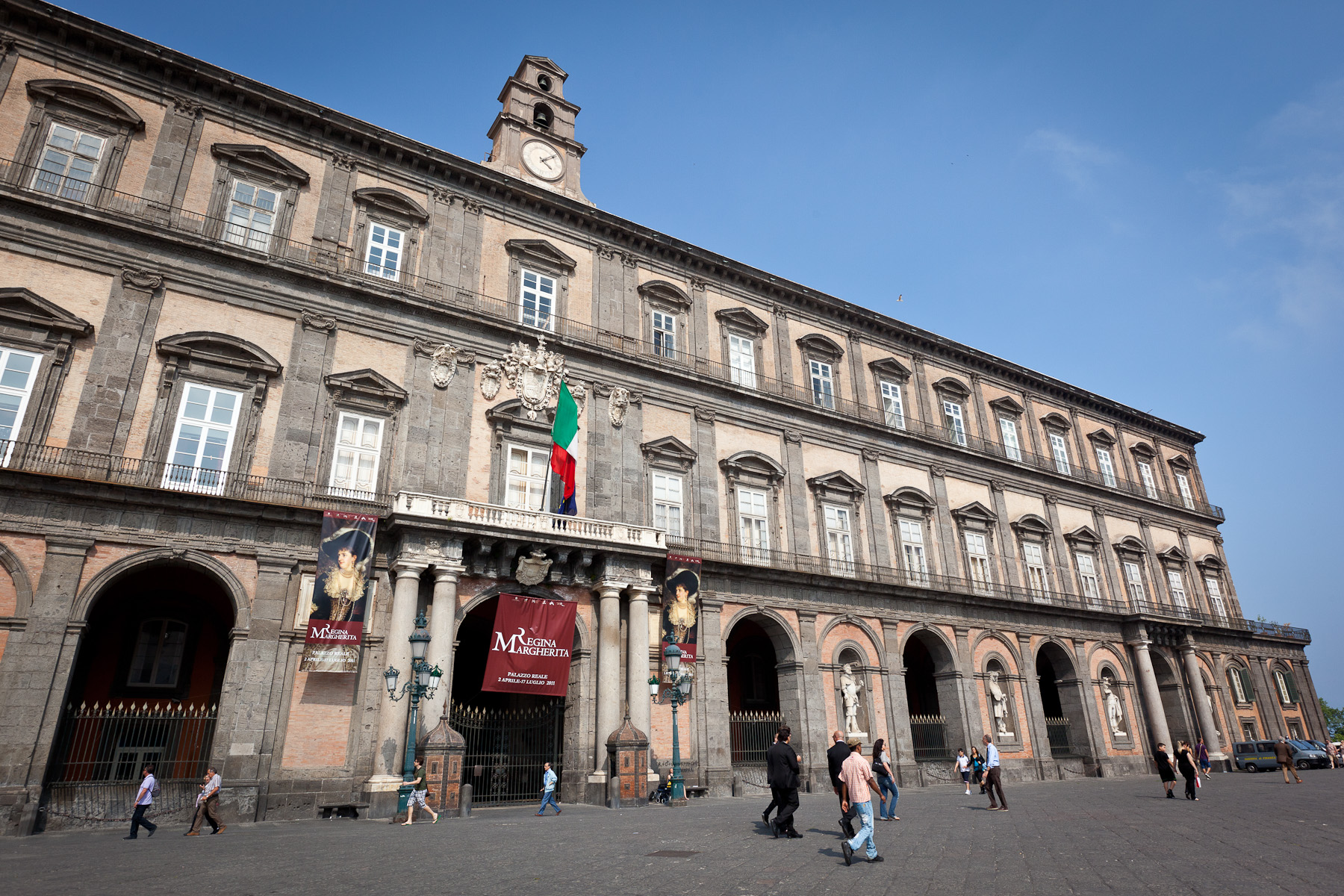 Napoli